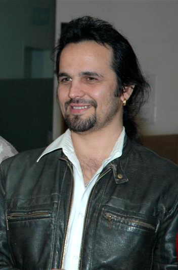 Fotografia pictorului Romeo Niram